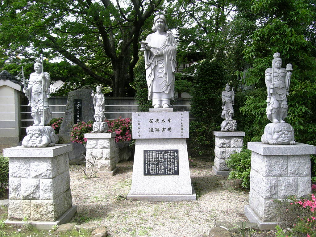 大聖勝軍寺にある聖徳太子像と四天王像